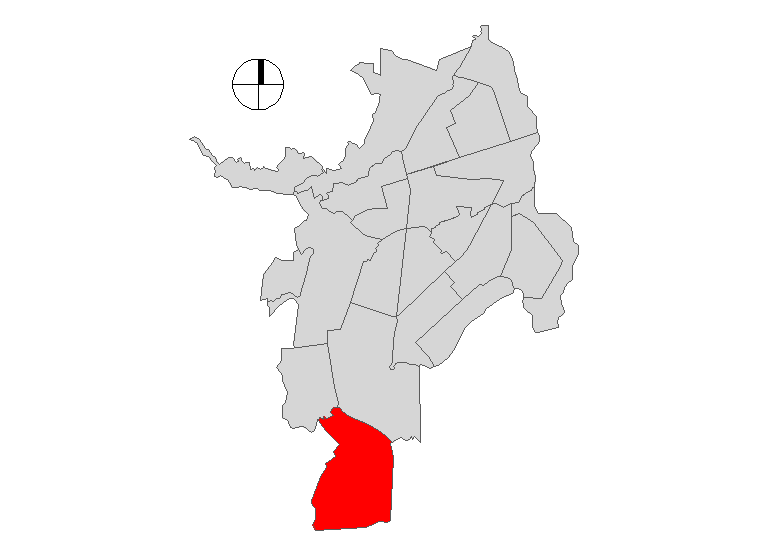 Comuna 22 de Santiago de Cali, Colombia.